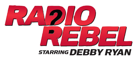 Logo des Films Radio Rebel